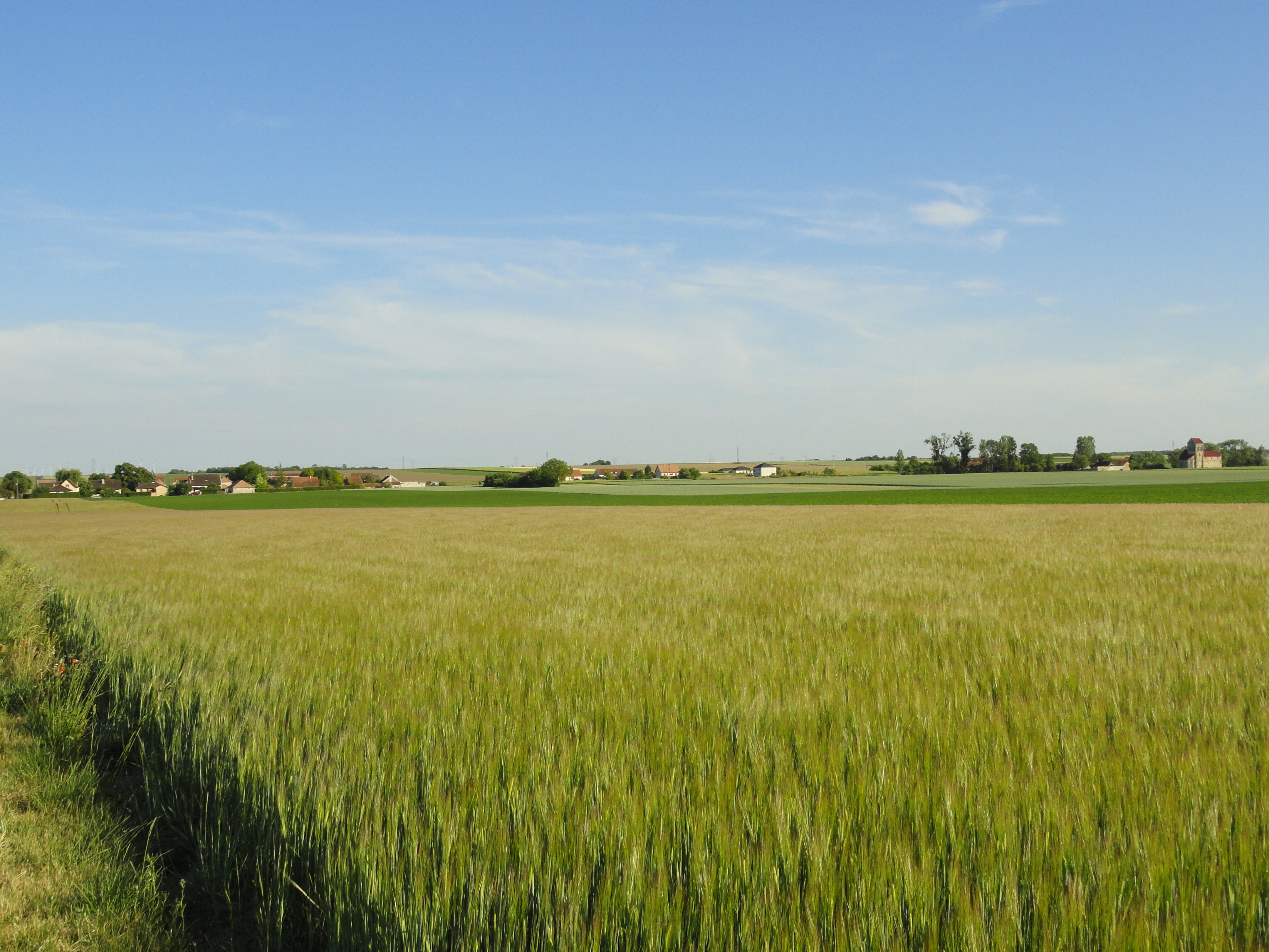 Vue générale des Istres-et-Bury depuis la route départementale 337. A gauche, se trouve Bury ; au centre Entre Deux Villes et à droite Les Istres.